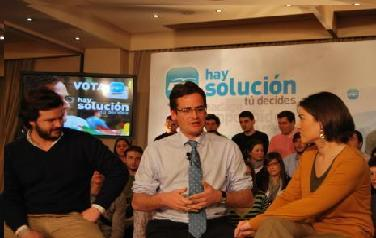 Antonio Basagoiti en un mitin joven, foto hecha por mí y reducida en paint.